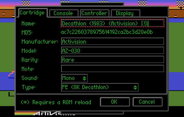 Pantallazo del emulador de Atari 2600 Stella funcionando bajo linux. El pantallazo muestra la ventana "Game Properties" con el emulador funcionando. El pantallazo ha sido tomado con la utilidad "xwd" y convertida a .png con la utilidad "convert".